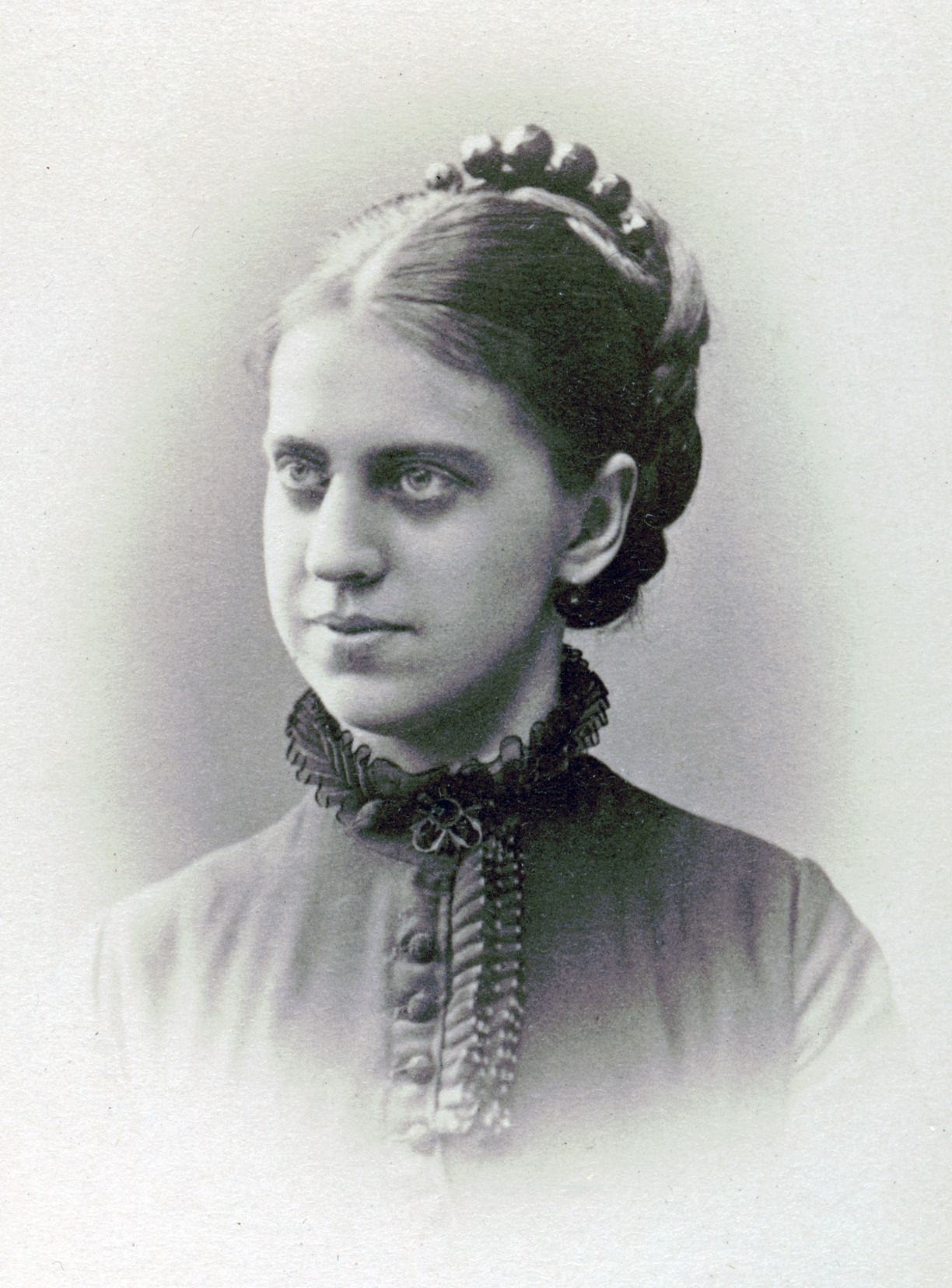 Mathilda Grabow, sångare vid Kungliga Operan. Odaterat porträtt